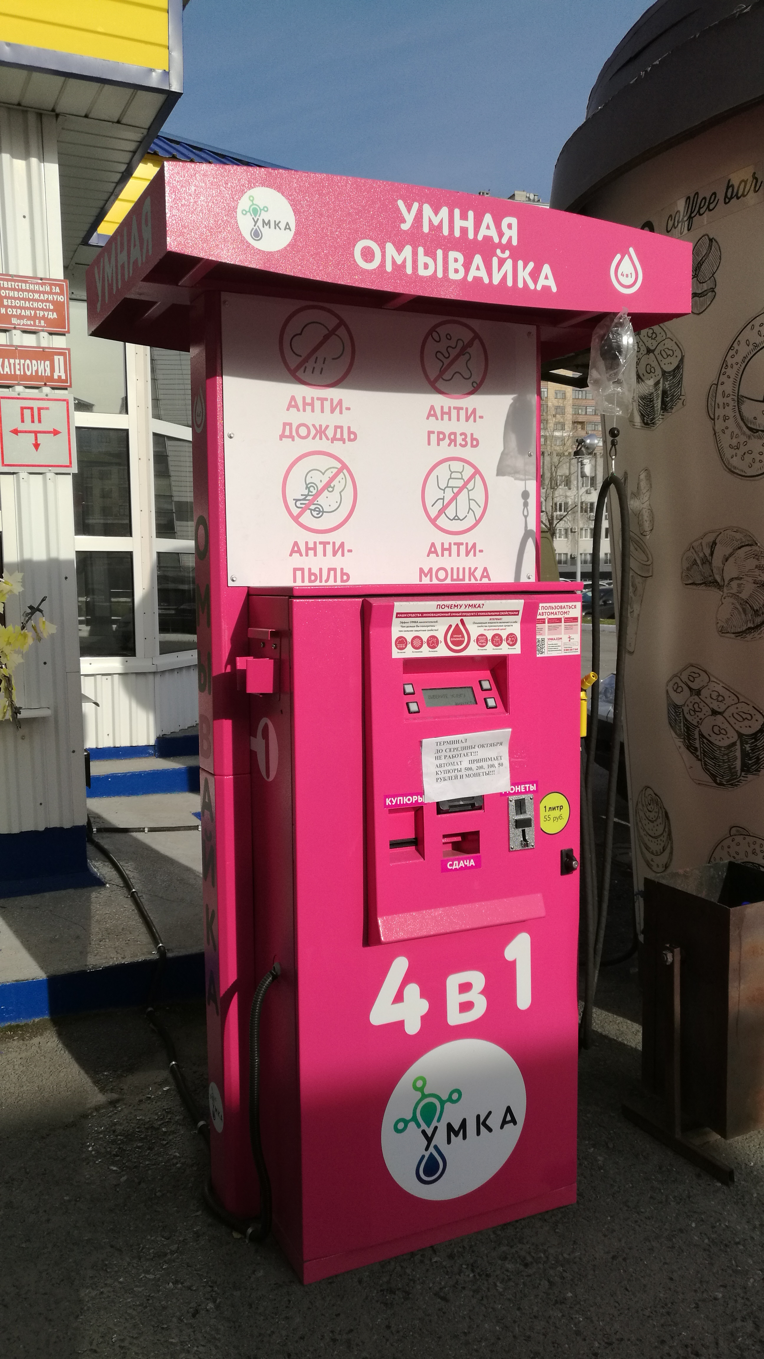 Instalaĵo por aŭtomobilaj lavlikvaĵoj. Tjumeno, Rusio.